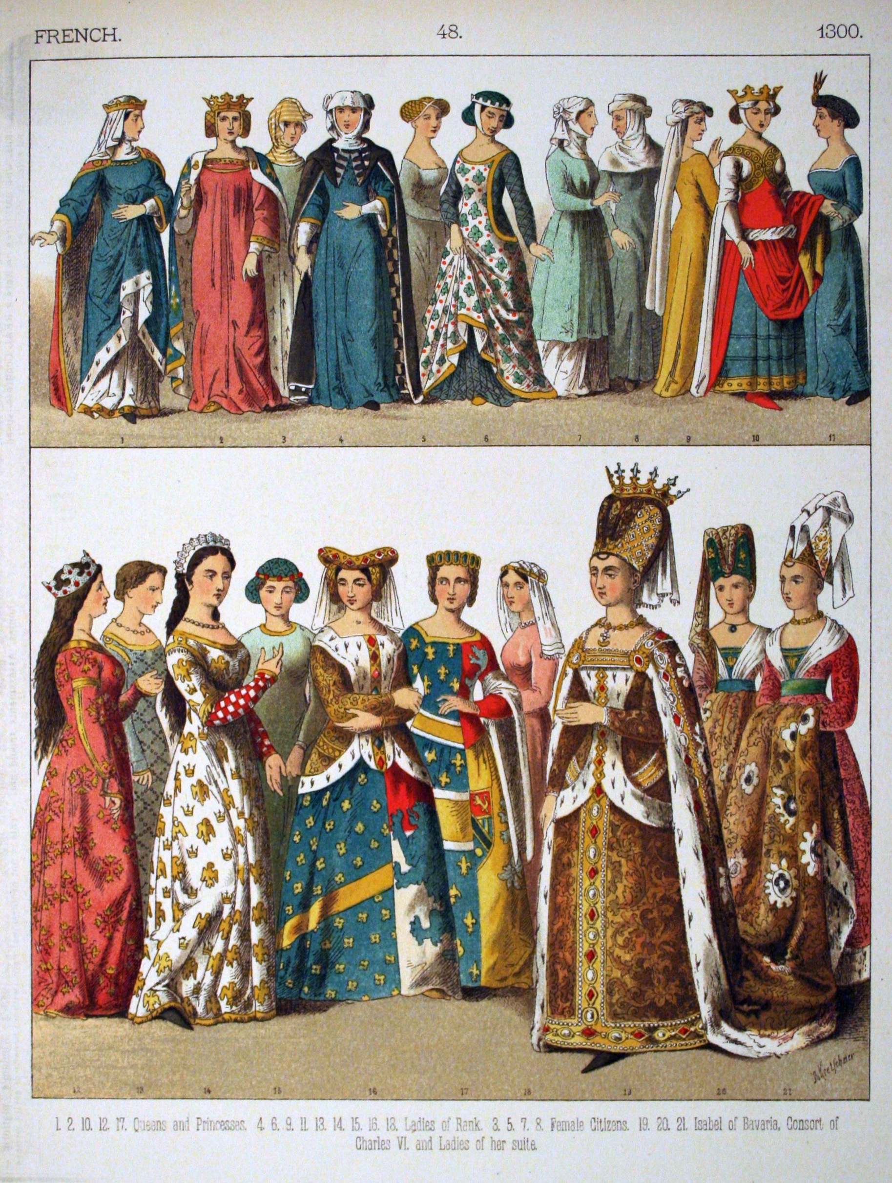 1300, French